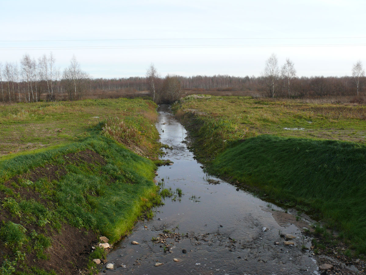 Река Каменка - приток Порусьи. Старорусский район Новгородской области